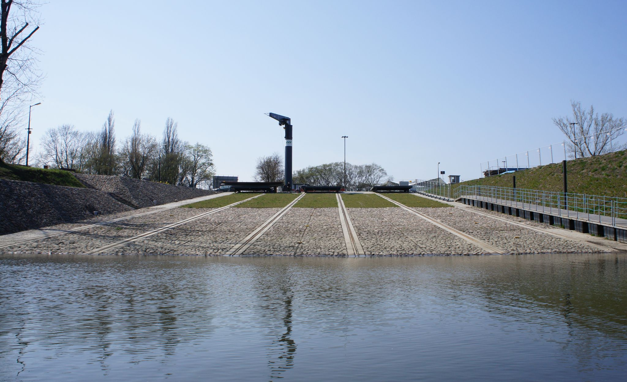 Pochylnia w pobliżu "Przystani Warszawa" przy Porcie Czerniakowskim.